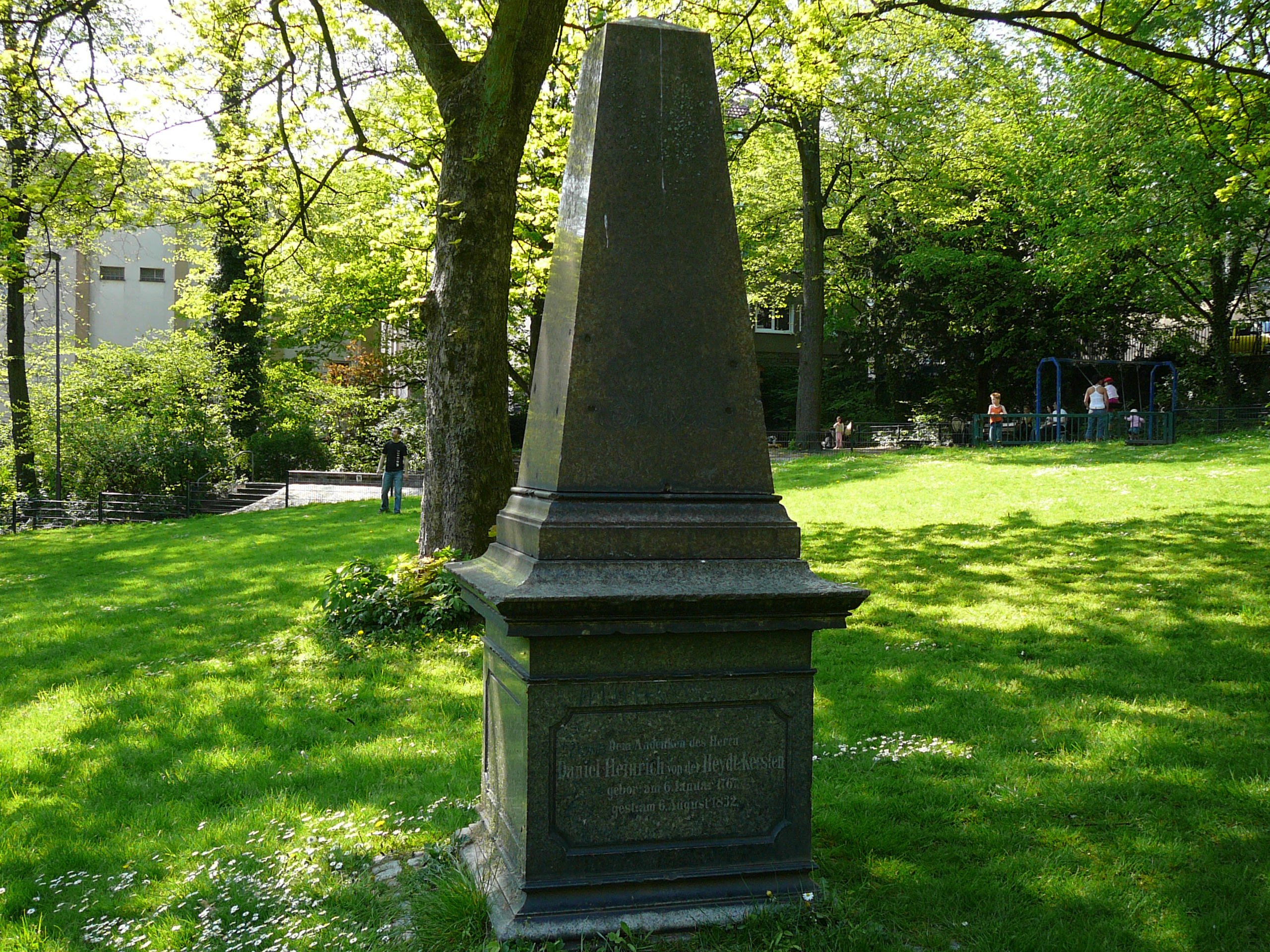 Else-Lasker-Schüler-Straße, Wuppertal